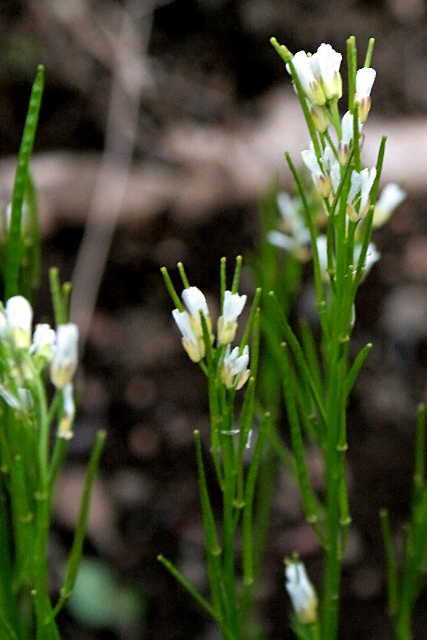 Ísland, Akureyri Botanical Gardens (Gartenecke 'Flora Islandica'): Rauhaarige_Gänsekresse_(Arabis_hirsuta)